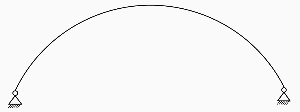 Zweigelenkbogen